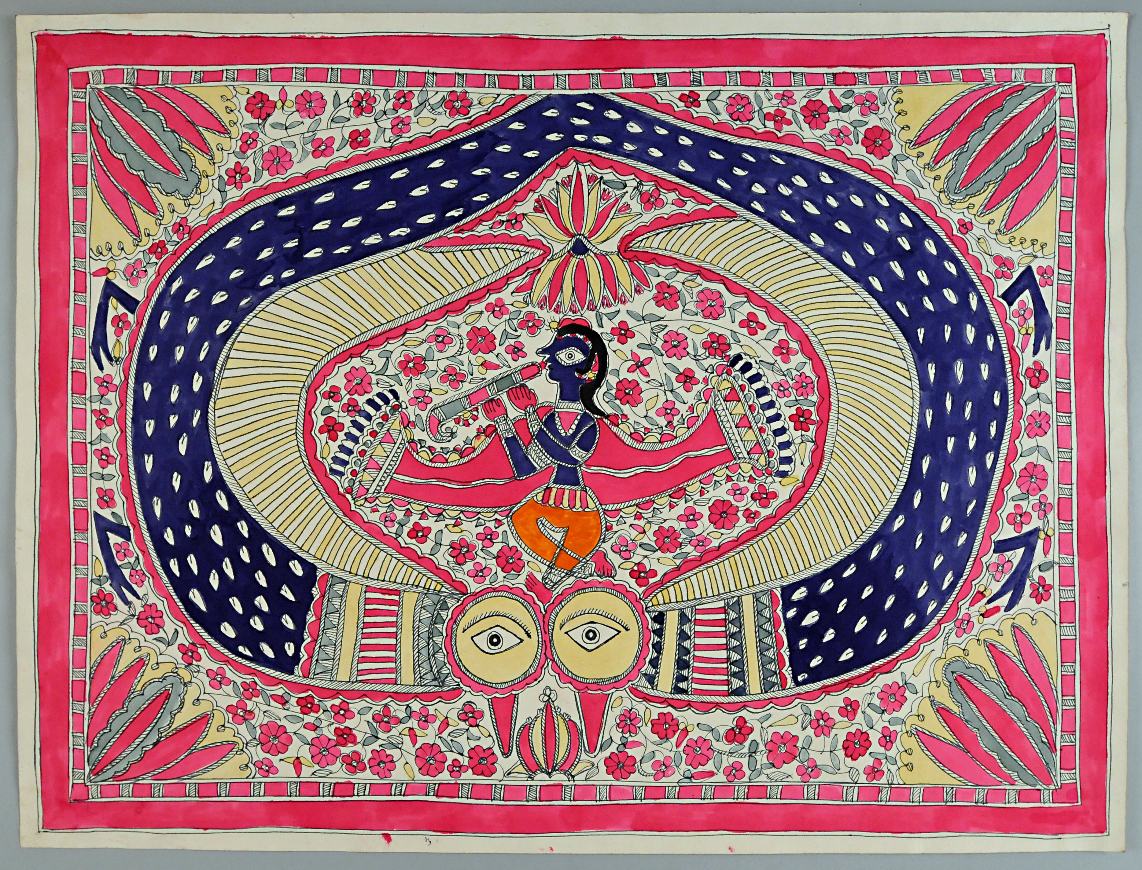 Przedstawienie Kryszny w typie Kalijahimardaka - Pokonującego węża Kaliję. Jest to epizod z młodzieńczego etapu życia Kryszny, gdy mieszkał w wiosce Wryndawanie, gdzie zajmował się wypasaniem bydła, psotami i graniem na flecie. Pewnego razu w rzece Jamunie w pobliżu wioski zamieszkał wąż (naga) Kalija z żonami (nagini). Nagowie to istoty półboskie, najczęściej przedstawiane jako pół-ludzie pół-węże. Woda została zatruta i ani mieszkańcy,a ni zwierzęta nie mogli z niej korzystać. Kryszna chcąc uwolnić wioskę od niebezpieczeństwa postanowił zabić Kaliję, przybrał więc ciężar całego wszechświata i zaczął tańczyć na głowie węża. Za nagą wstawiły się jednak jego żony, które na obrazie widoczne są po obu stronach Kryszny. Obraz typu Madhubani, wykonany w stylu bharni (kolorowym), wywodzącym się z tradycji wyższych warstw społecznych. Malarstwo tego typu jest typowe dla regionu Mithili w północnym Biharze i południowym Nepalu. Praktykowany głównie przez kobiety, początkowo jako malarstwo ścienne i podłogowe, od lat 60 XX w. również na papierze. Wykonywane często z okazji świąt religijnych i rodzinnych.